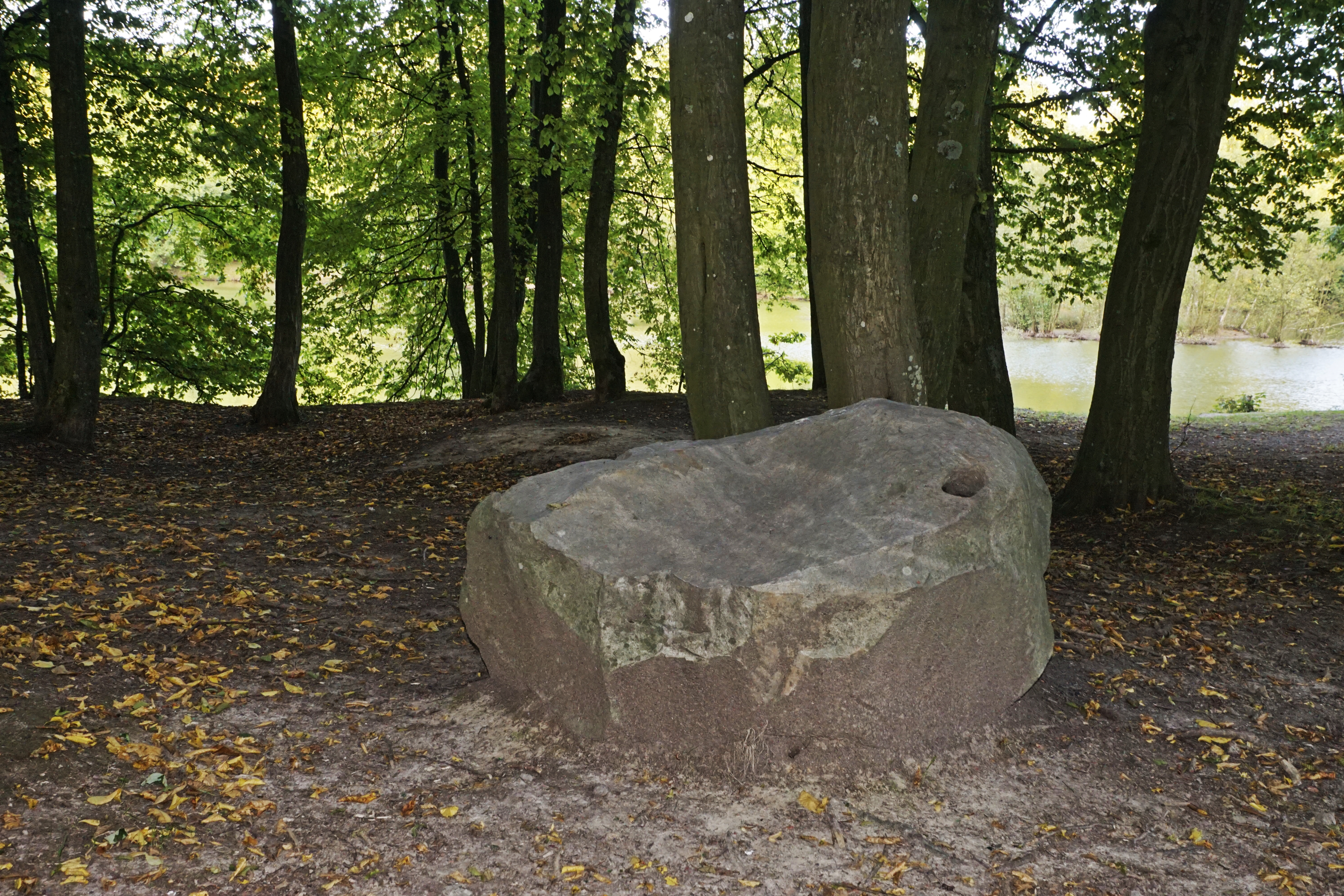 Polissoir lieu-dit Le Flaquet, Grand Bois Lévêque à ORS. .